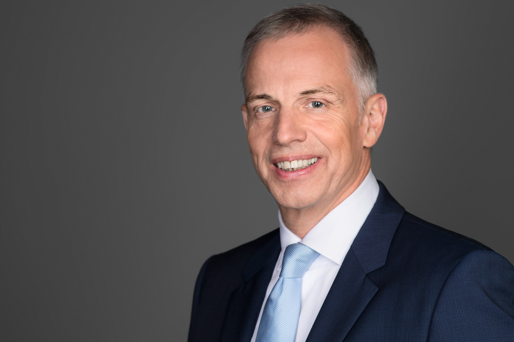 Andreas Krautscheid, Mitglied der Hauptgeschäftsführung im Bundesverband deutscher Banken e.V.